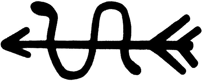 Brandzeichen Berlin-Brandenburg